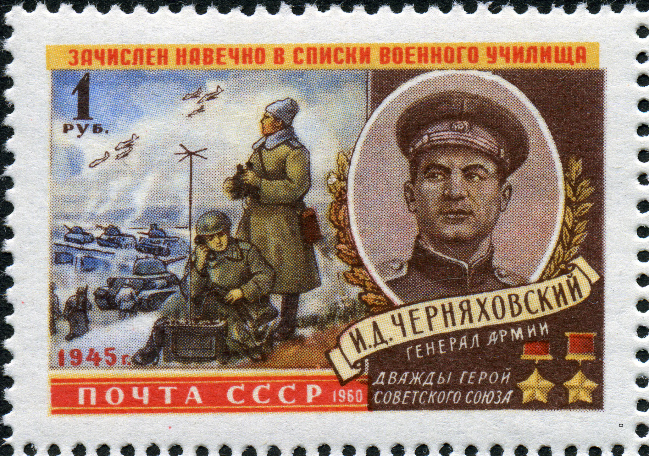 Марка СССР из серии «Герои Великой Отечественной войны, зачисленные навечно в списки воинских частей». Портрет Дважды Героя Советского Союза И. Д. Черняховского, медаль «Золотая Звезда», изображение команлного пункта. Художник — Л.Голованов. Марка выпущена в обращение в феврале—мае 1960 года тиражом 1,5 млн. экземпляров. Описание по изданию «Каталог почтовых марок СССР 1918 —1974», М., 1976.